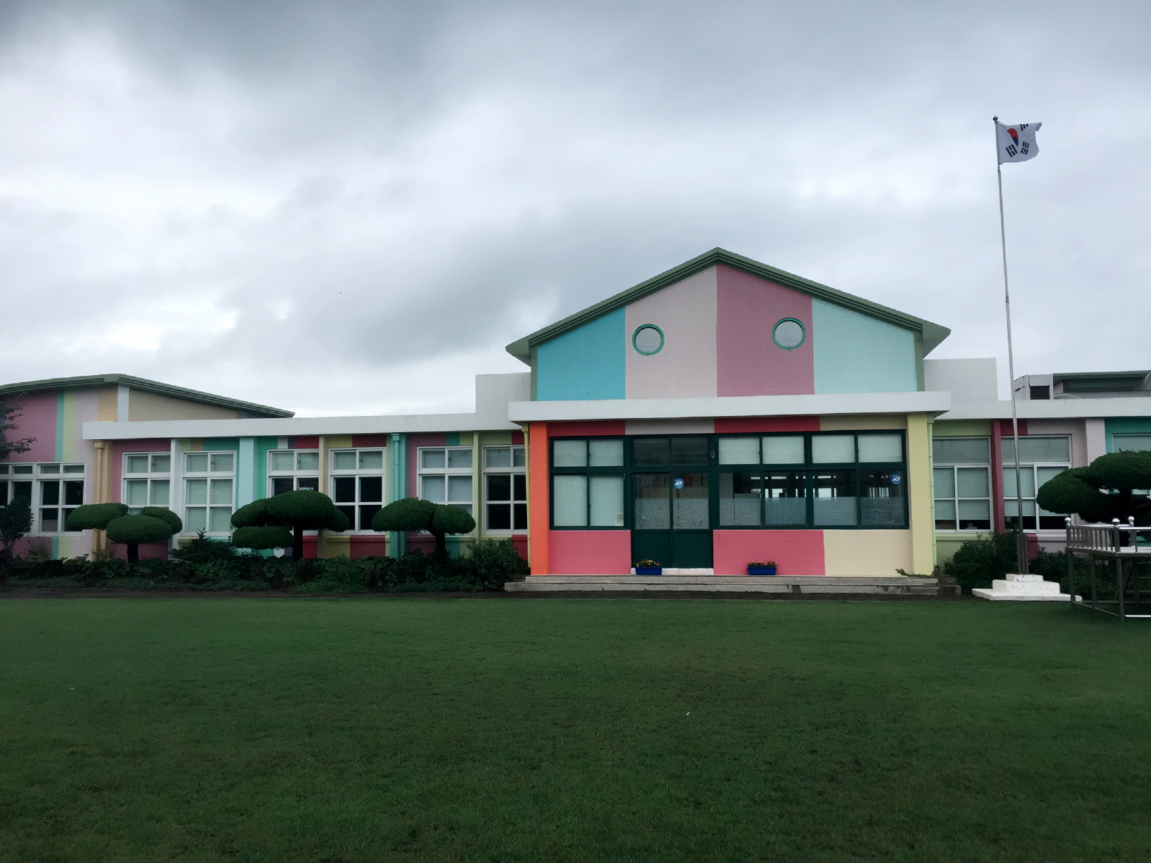 김녕동복초등학교 동복분교